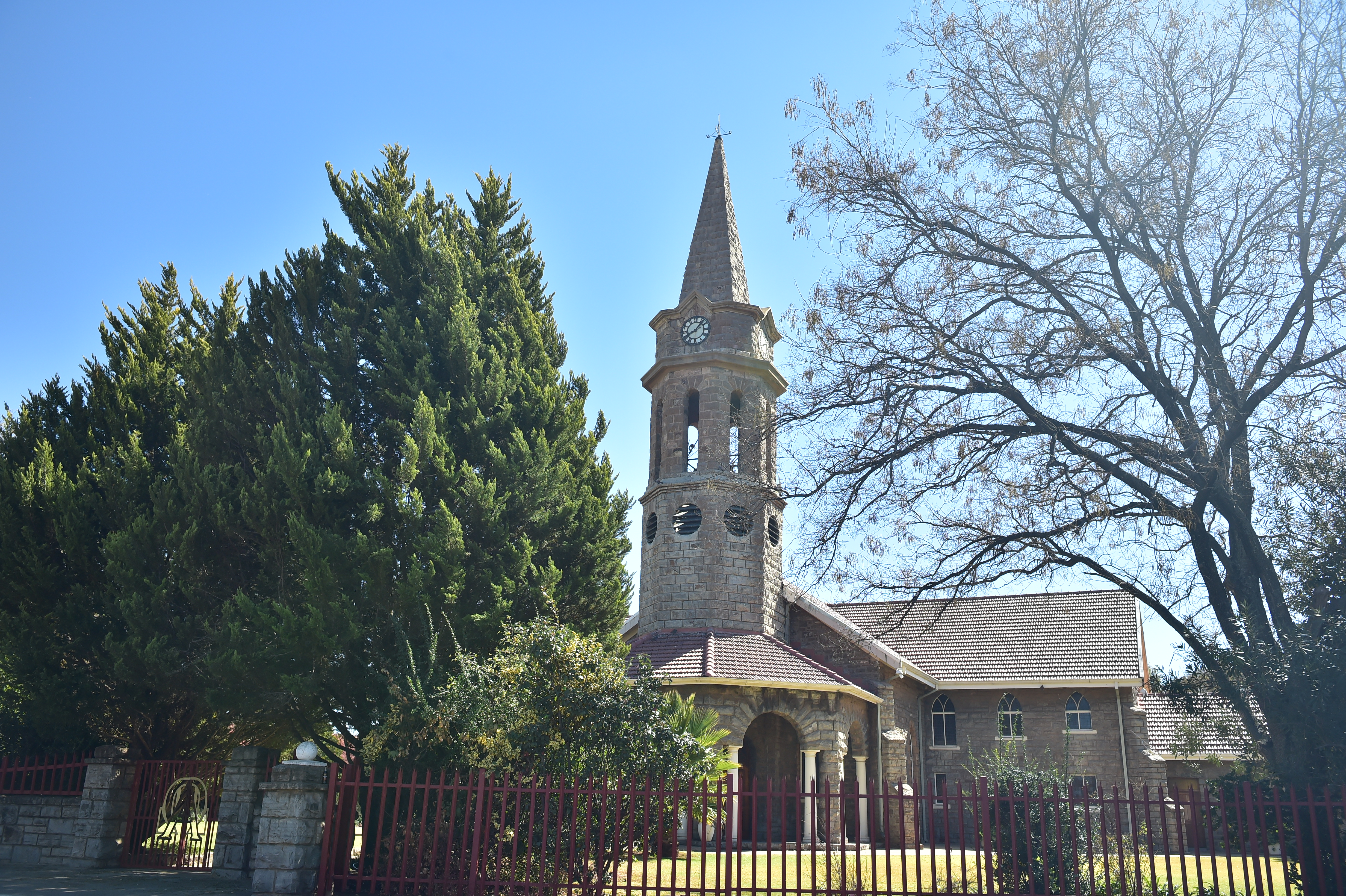 Vue du North West en Afrique du Sud.